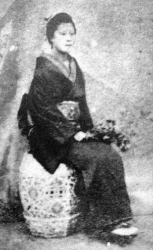 a Japanese woman 木戸松子 (Matsuko Kido)